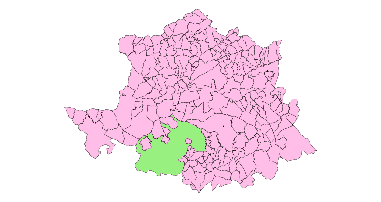 Localización de Cáceres en la provincia.